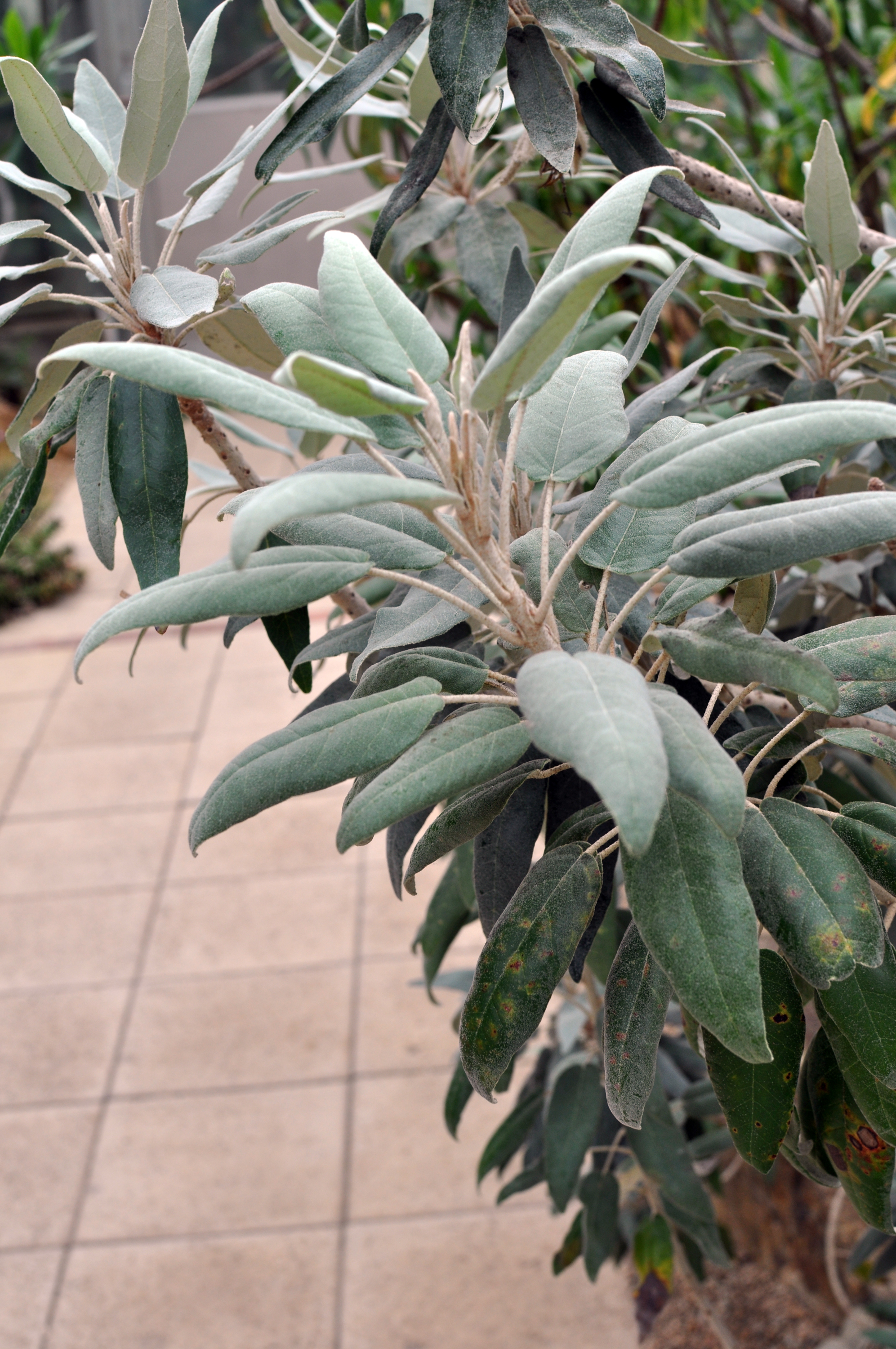 Trochetia boutoniana at Conservatoire botanique national de Brest